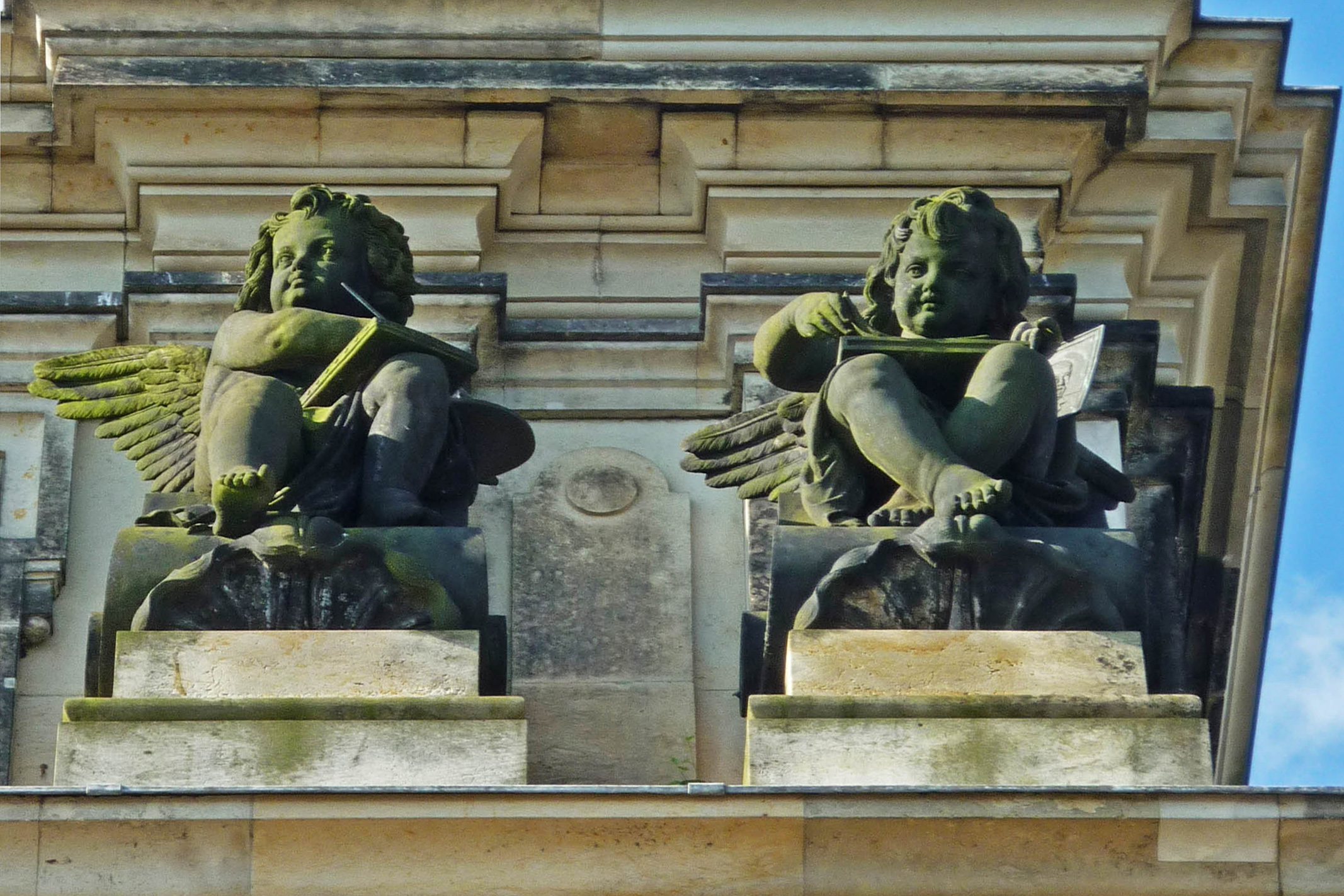 Geflügelte Putten der Malerei und der Kupferstecherei (rechte Gruppe) am Mittelrisalit der Kunstakademie Dresden von Reinhard Schnauder (1892)